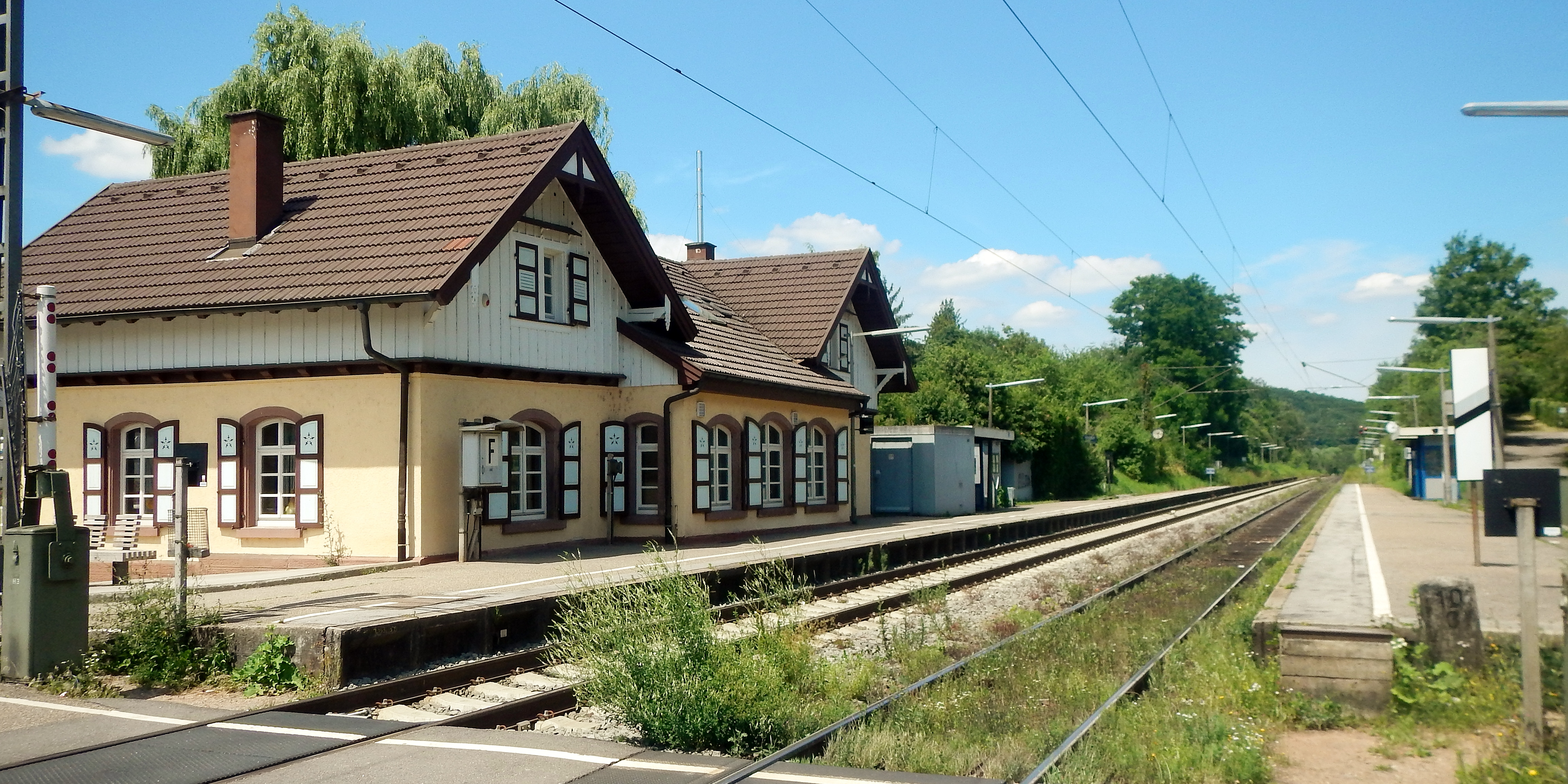 Bahnhof Pfinztal